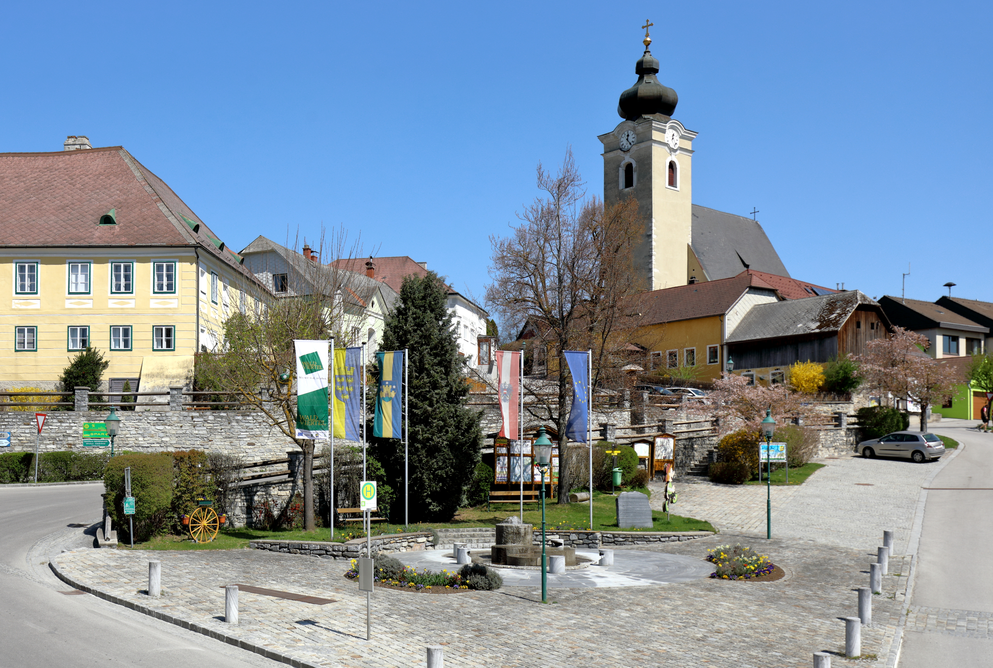 Südwestansicht des Zentrums bzw. des Marktplatzes von Kottes, ein Ortsteil und der Hauptort der niederösterreichischen Marktgemeinde Kottes-Purk. Im Hintergrund die weithin sichtbare röm.-kath. Pfarrkirche Mariä Himmelfahrt.